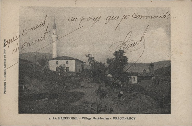 Драгоманци през Първата световна война.